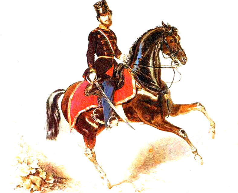 Borsos József: Huszár (akvarell)